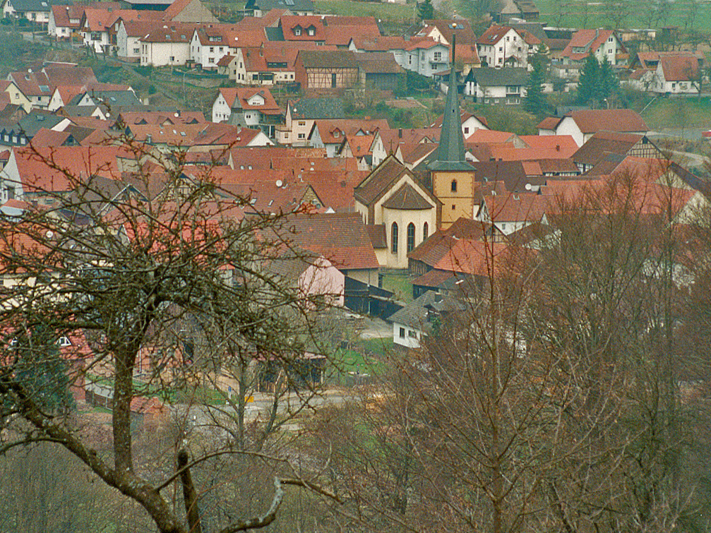 Obererthal, Übersicht vom Küchenberg